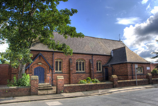 Village Hall, Ulleskelf